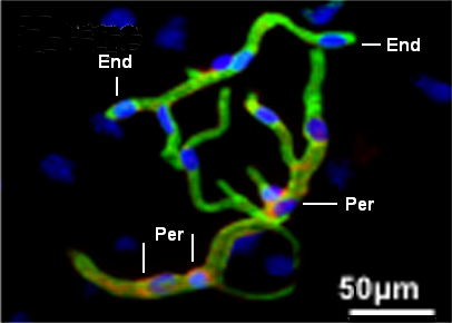 Fig. 5.A. Componentes celulares de aislados de BrMV determinados por inmunotinción. Capilares cerebrales. Se muestra la disposición y el diámetro de su luz inferior a 12μm. Células endoteliales (End) en verde. Pericitos (Per) en rojo. Núcleos celulares en azul. Tinción con Inmunofluorescencia: lectina marcada con fluoresceína (en verde) para células endoteliales. PDGFR-β anti-ratón para pericitos. Contratinción con DAPI (azul) para ácido nucleico. Microscopio confocal. Barra de escala= 50μm.